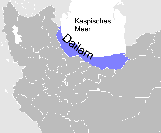 Die historische Region Dailam am Kaspischen Meer. Farbig hinterlegt sind die heutigen iranischen Provinzen Gilan (links) und Māzandarān (rechts).